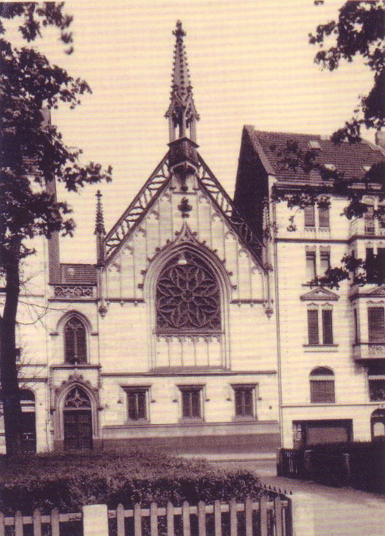 altlutherische St. Johanniskirche (Köln)